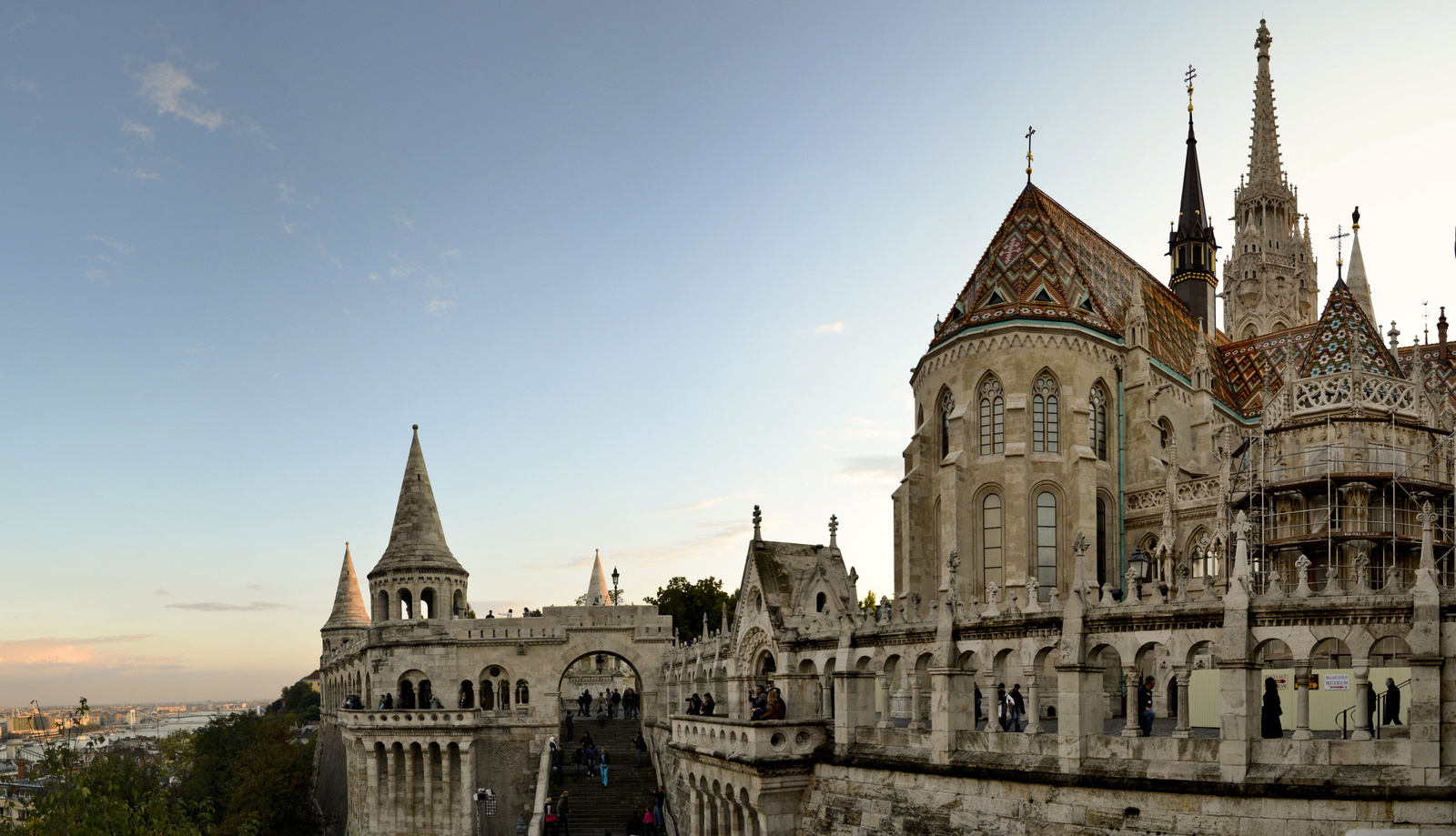 Mátyás templom (Budapest 1, Szentháromság tér) This is a photo of a monument in Hungary. Identifier: 139